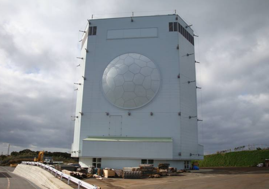 J/FPS-5（鹿児島県薩摩川内市にある下甑島固定式３次元レーダー装置）2008年11月に完成。防衛省の資料より写真のみ抜取